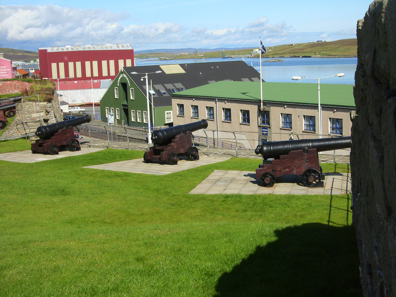 Vue orientale du fort Charlotte situé à Lerwick, dans les Shetlands, en Écosse.